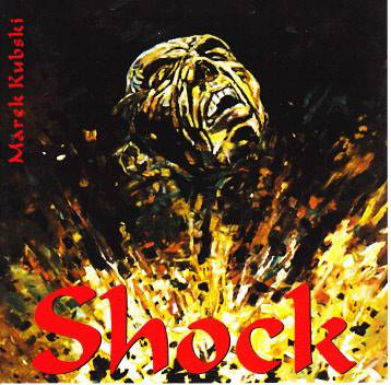 Okładka albumu muzycznego "Shock" (2000) wydanego przez Marka Kubskiego